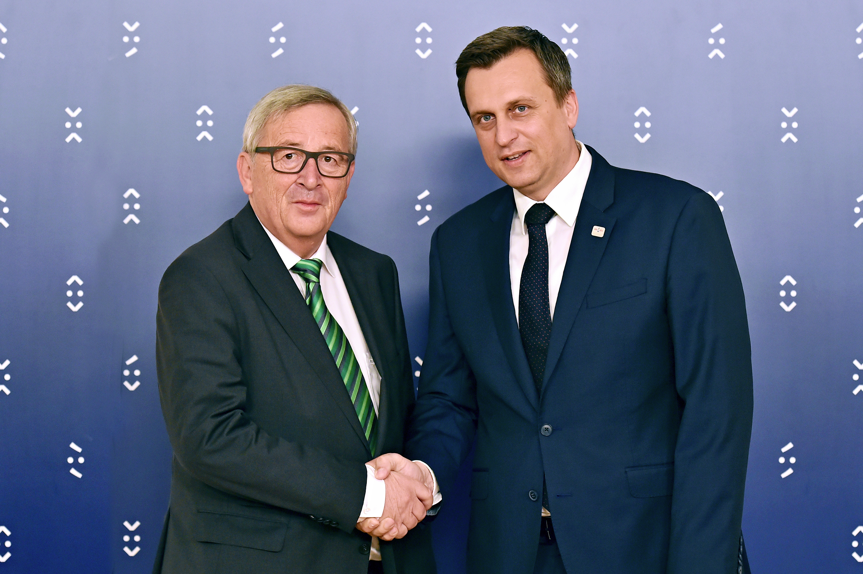 PHOTO RASTISLAV POLAK